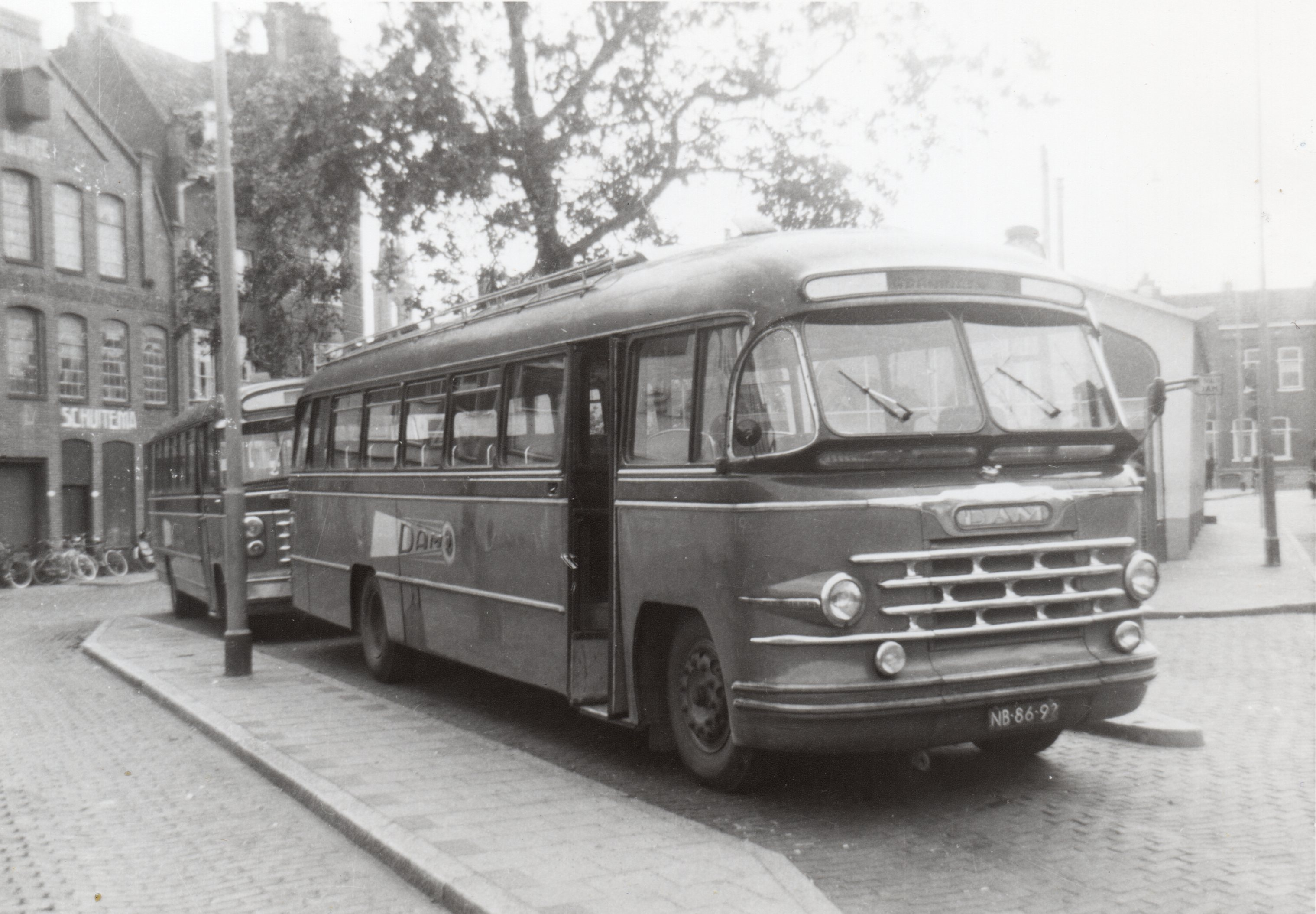 DAM-bus 119, Scania-Vabis/Medema, bouwjaar 1953, aan het Damsterdiep in Groningen in augustus 1965